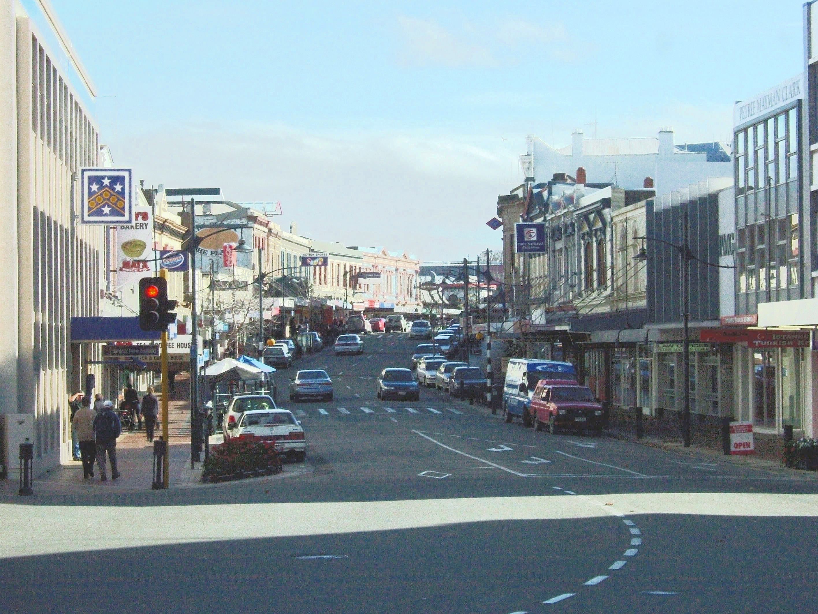 Stafford St in Timaru, Neuseeland